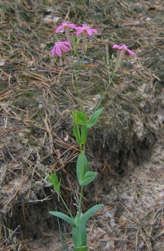 Поліський природний заповідник, Овруцький район, Селезівське лісництво